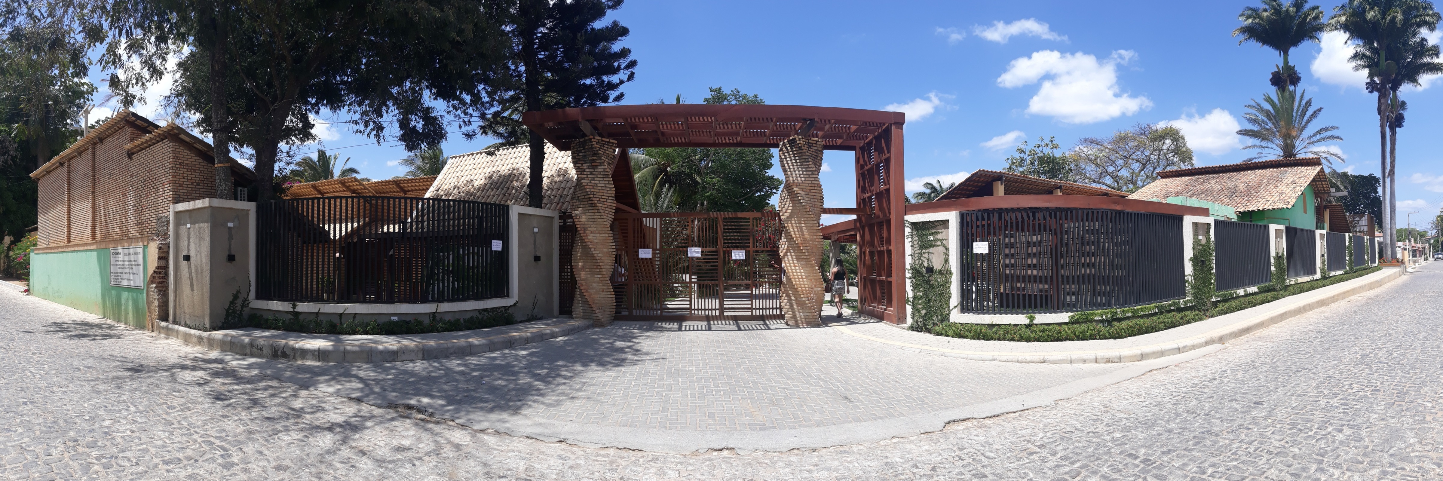 Hotel Chalé Lagoa dos Ingás em Martins, Rio Grande do Norte (Brasil)